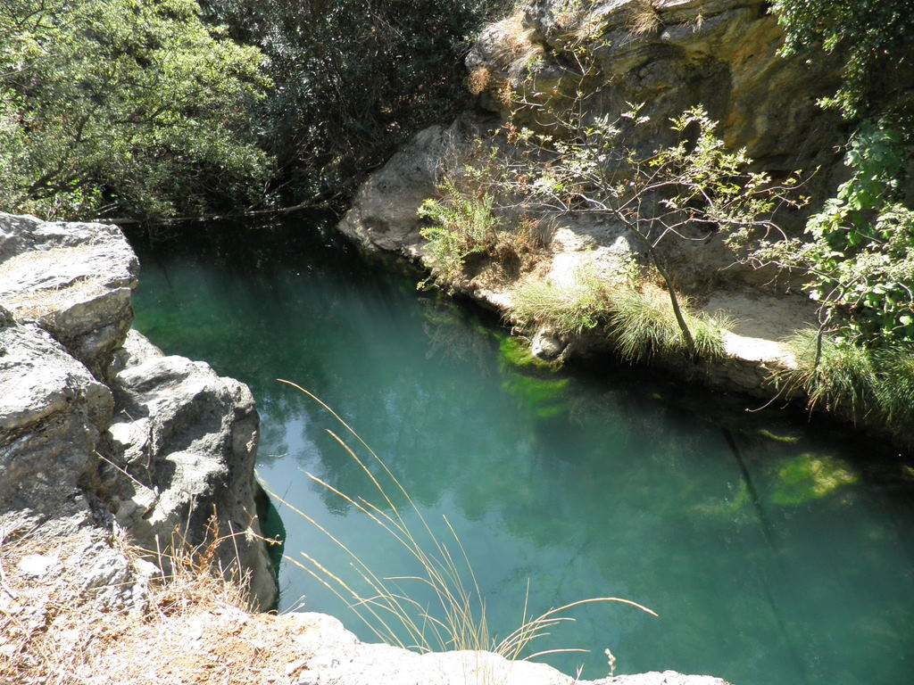 Turón River